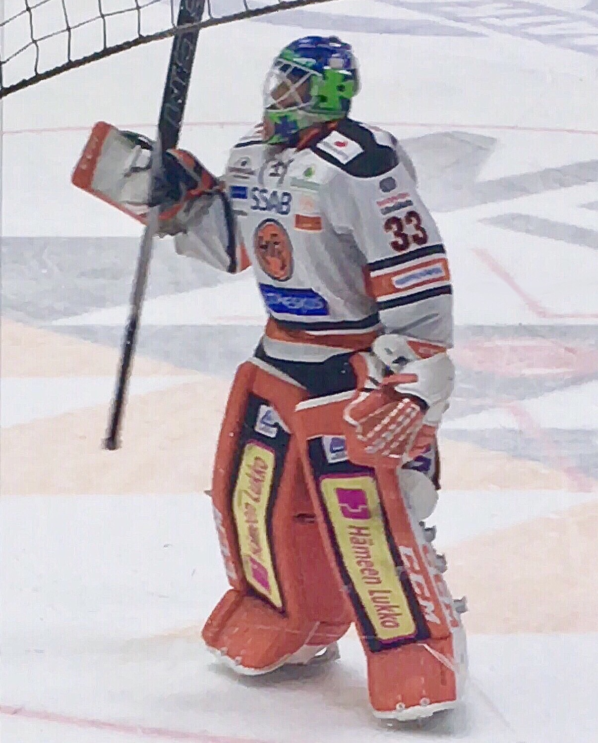 Jääkiekkoilija Emil Larmi edustamassa Hämenenlinnan Pallokerhoa 30. joulukuuta 2016 ottelussa Helsingin IFK:ta vastaan (kuvaa on jälkikäsitelty)